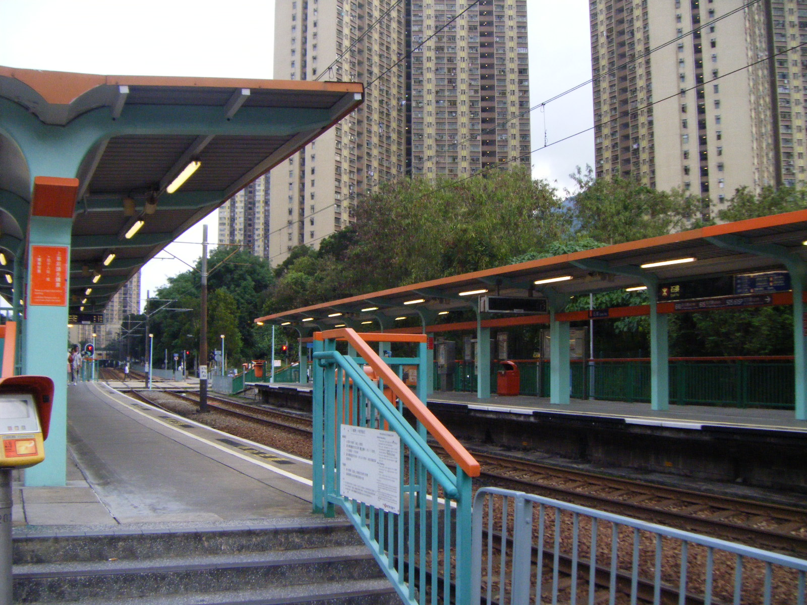 輕鐵石排站月台